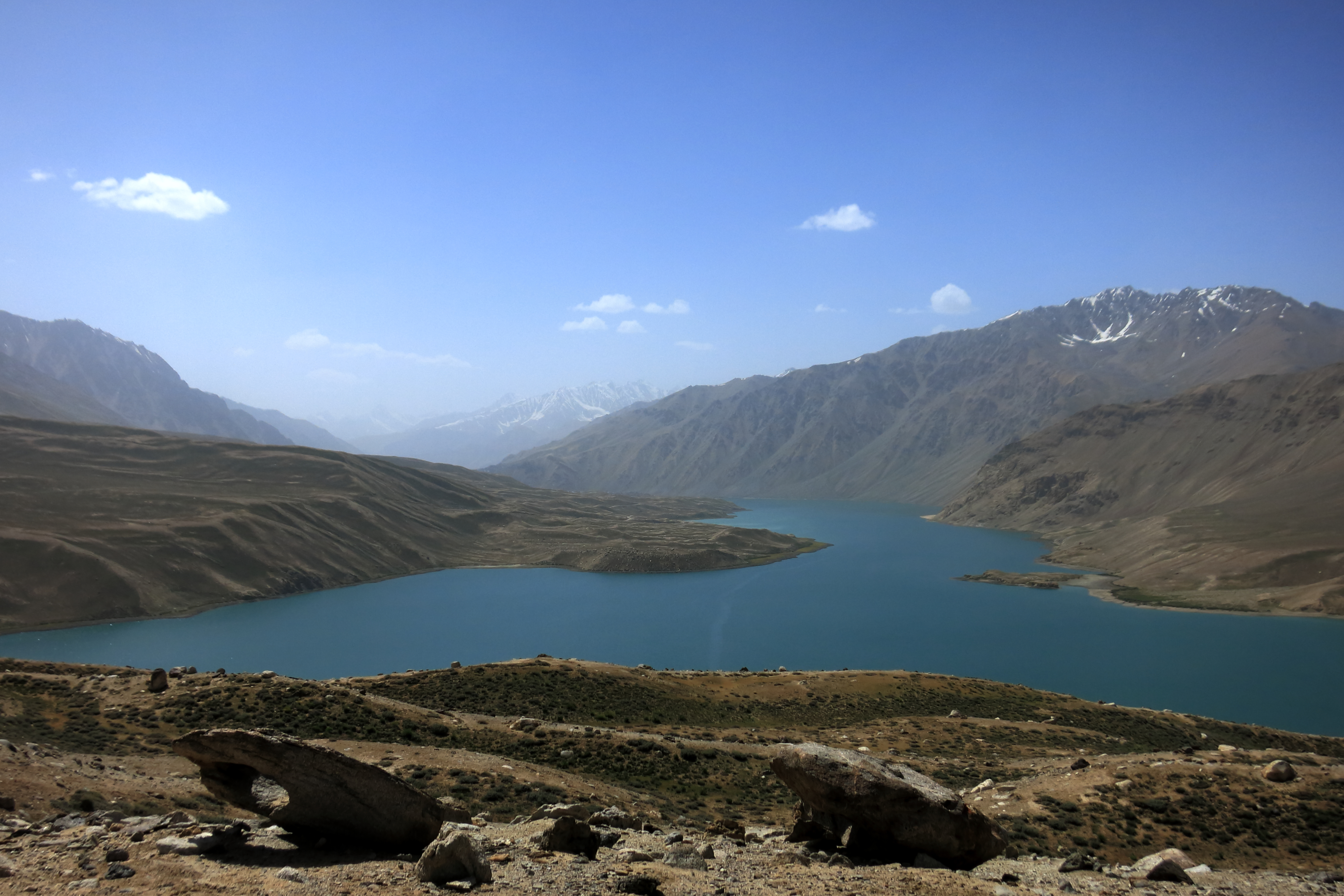 Westlicher Teil des Jaschilkul, Blick aus dem Südosten